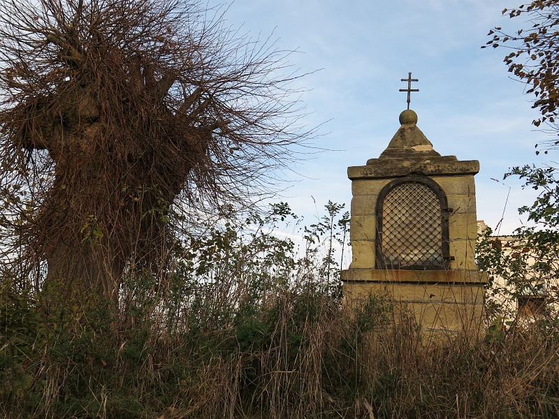 Boží muka, okraj obce, komunikace na Bystřici, Važice.